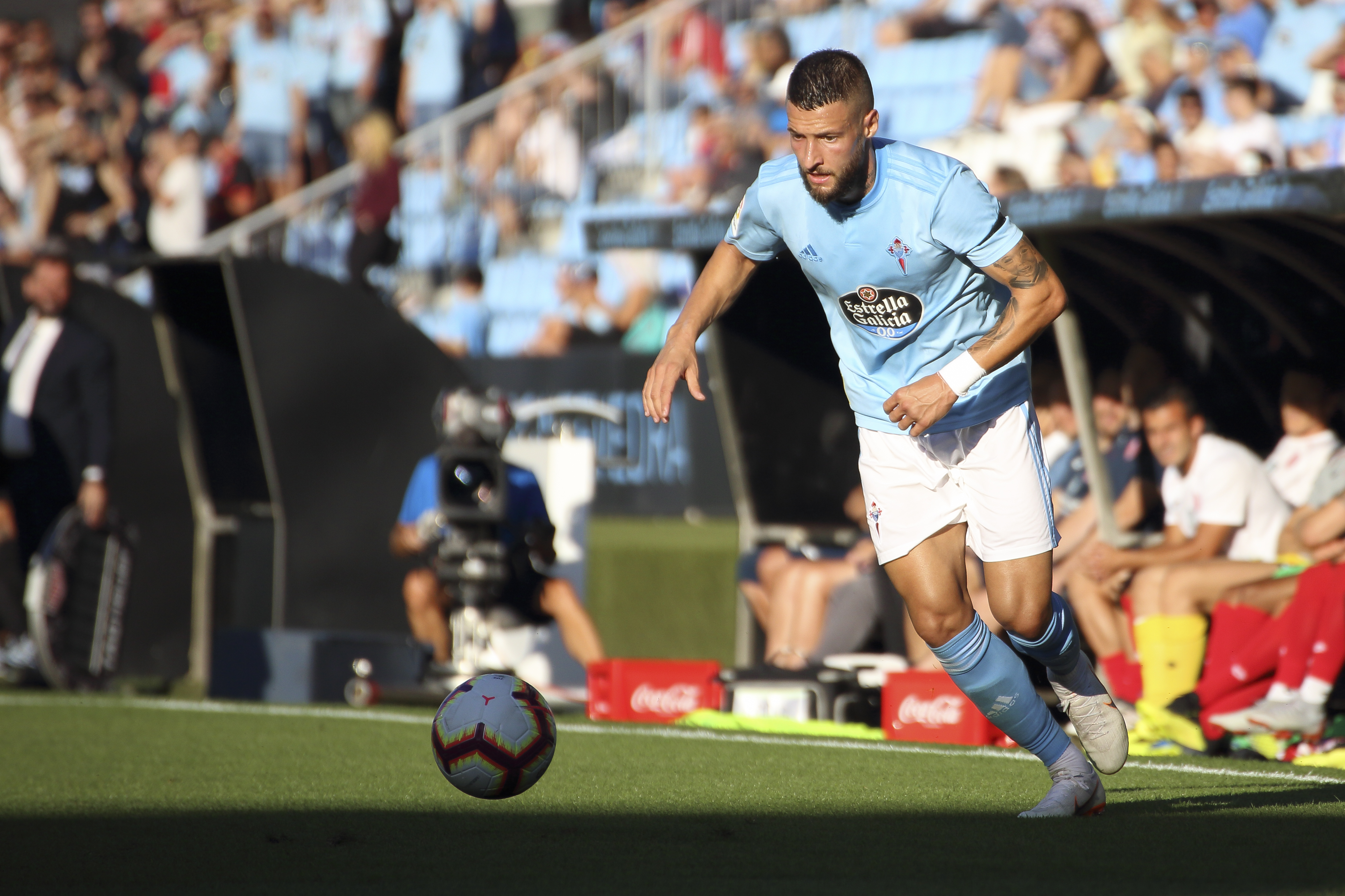 Partido disputado en los aledaños del Estadio de Balaidos, siendo el partido de presentación para el Celta ante su afición para la temporada 2018/2019